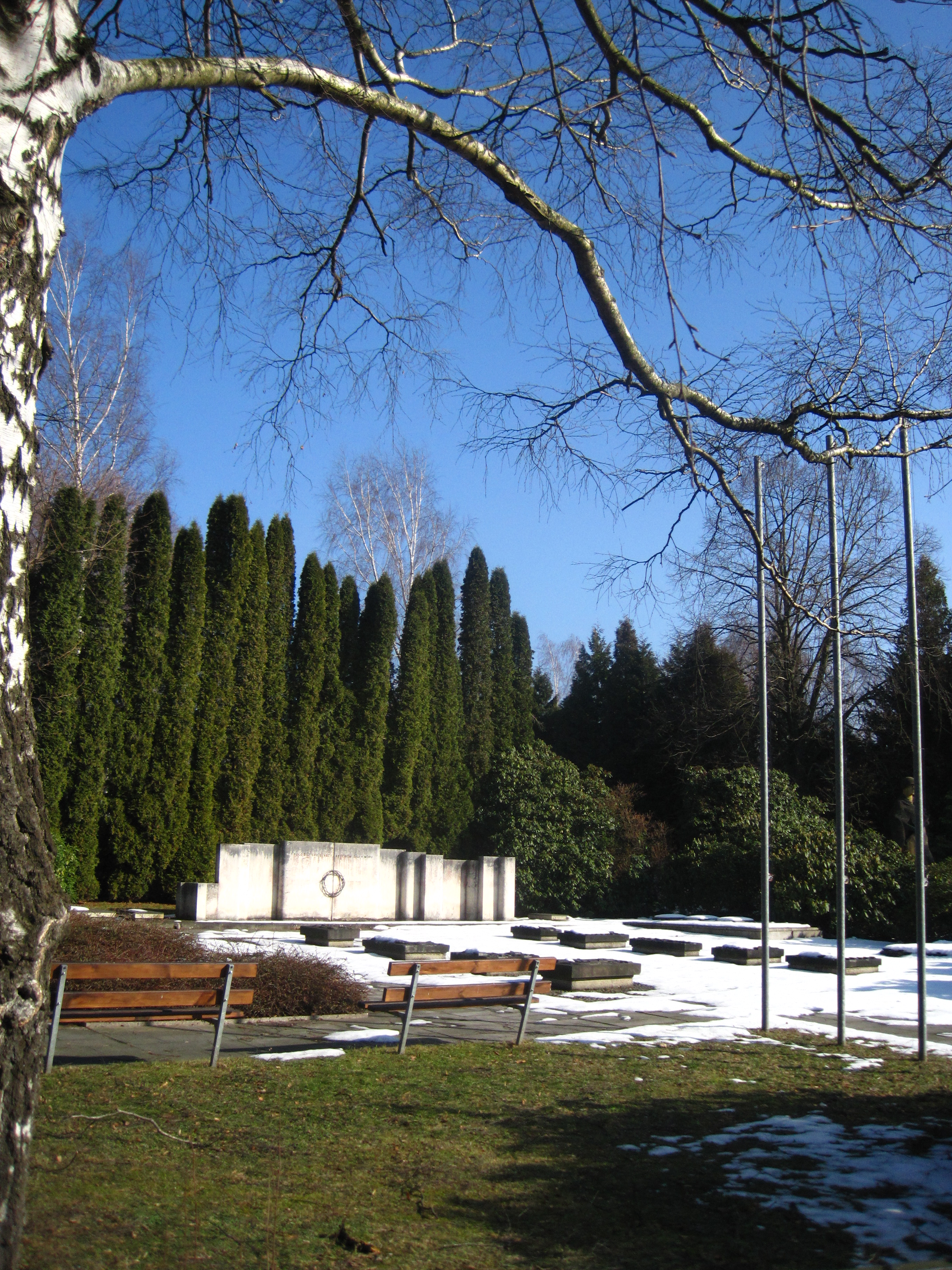 Liberec - Ruprechtický hřbitov - pomník obětem válek s nápisem "POLOŽILI SVÉ ŽIVOTY ABYCHOM ŽILI V MÍRU". V této - vojenské - části hřbitova nalezneme náhrobky sovětských vojáků z r. 1945 a obětí 2. světové války, dále památník Ukrajinců (1918-1920), hroby obětí 1. sv. války, socha rudoarmějce (přenesena z jiného místa v Liberci), horizontální reliéfy s označením bojišť 2. sv. války a oltář francouzského zajateckého tábora (umístěn 1998 - prosba o mír 15.8.1944), areál byl zrekonstruován r. 1975 a doplňován o další válečné památky. Uvádí se, že v současnosti je zde pochováno 95 osob. (Zdroj